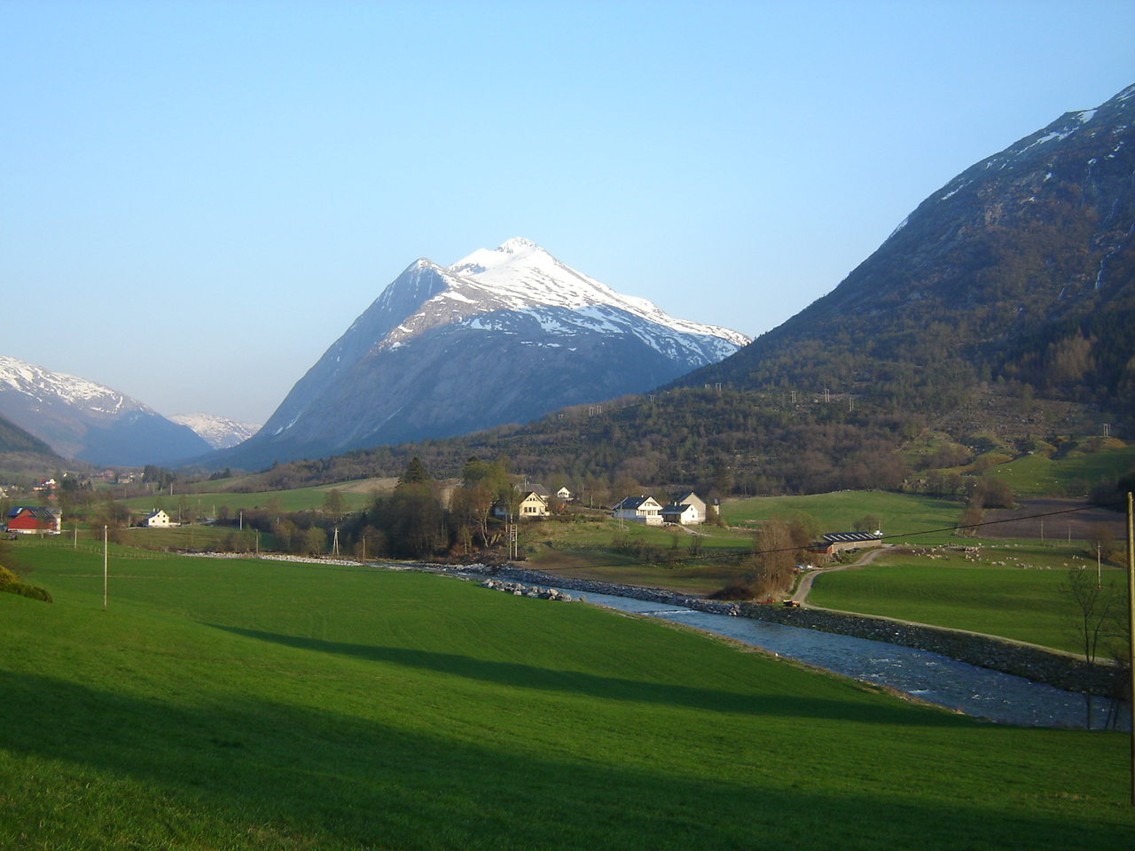 Mount Hogetinden & Uskedalen Valley by Døsland, Norway